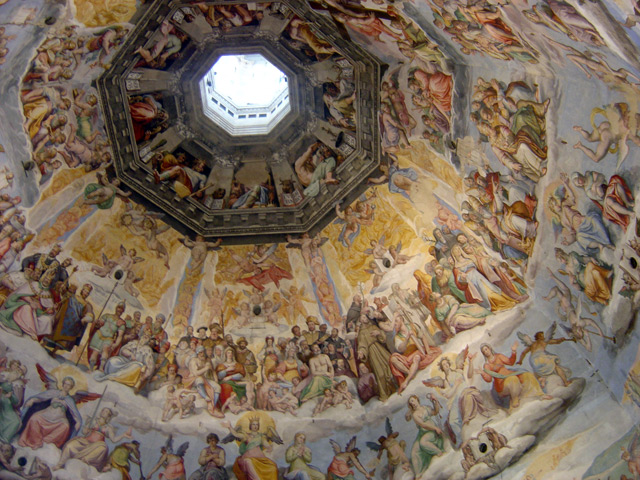 Interno Duomo, Firenze, Italy.